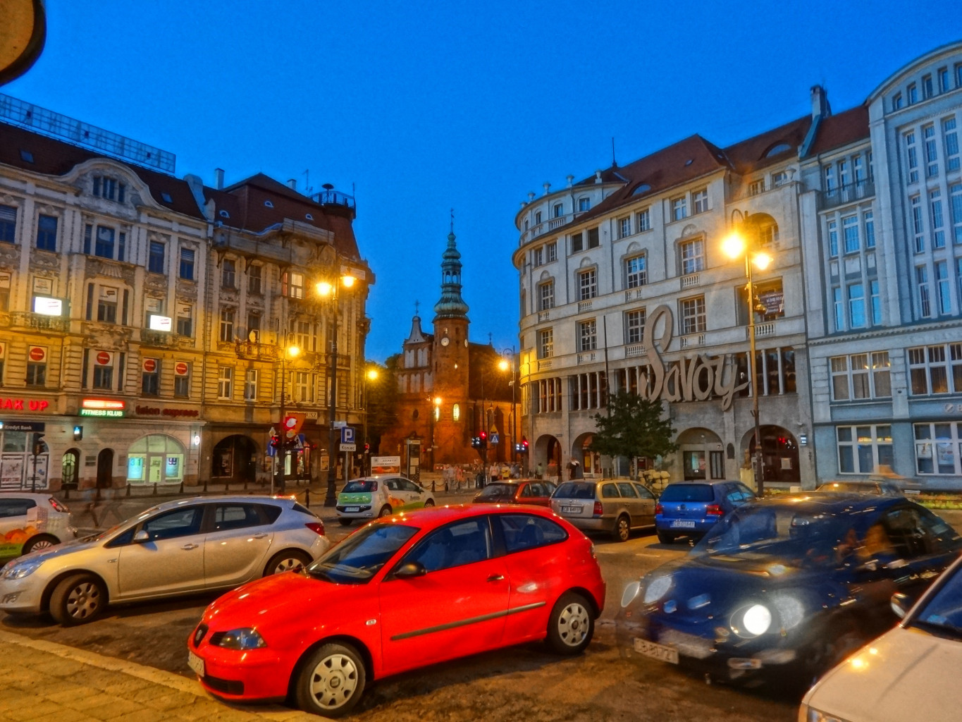 Plac Teatralny w Bydgoszczy